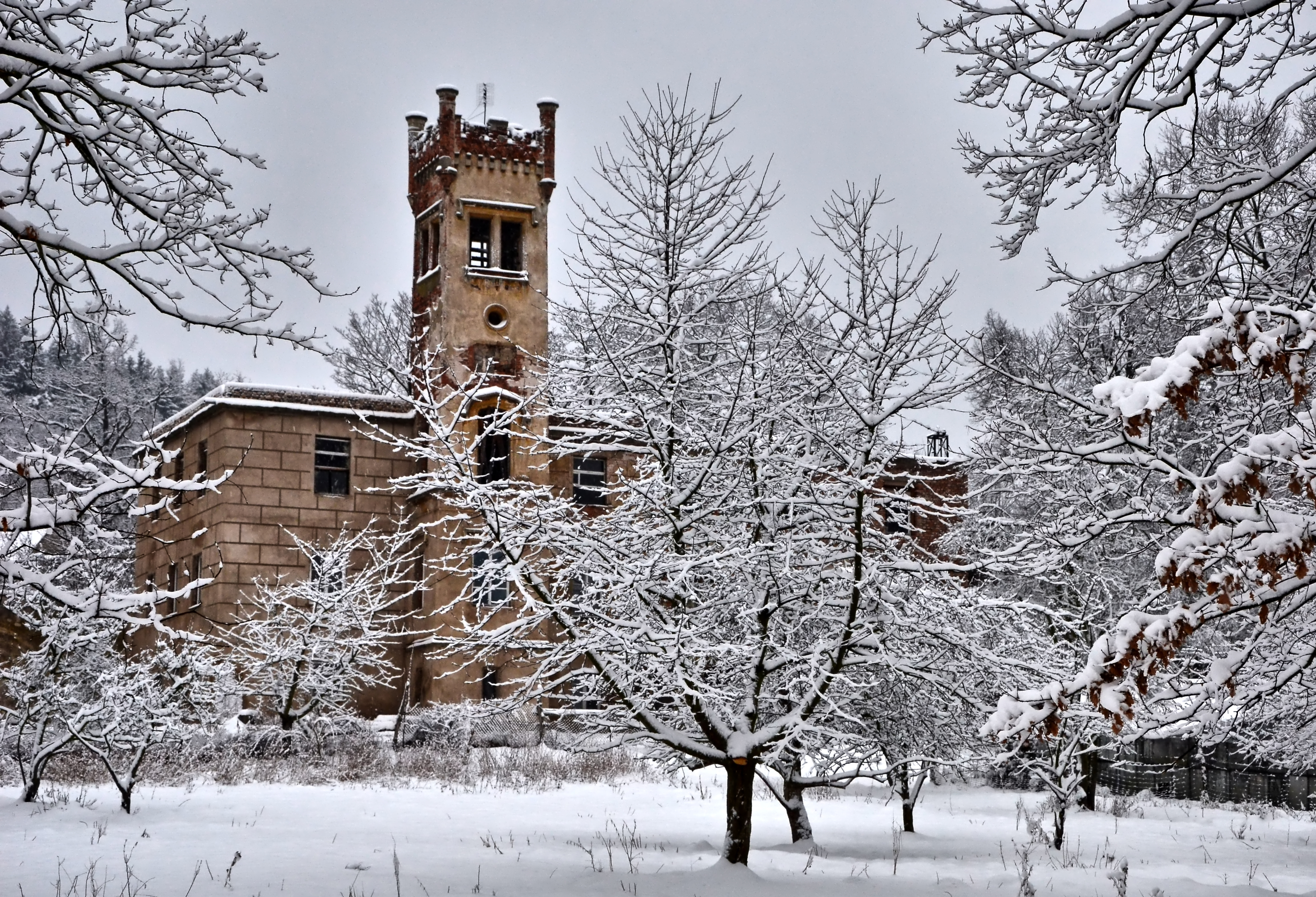 Pałac w Dąbrowicy. Gmina Mysłakowice, powiat jeleniogórski.